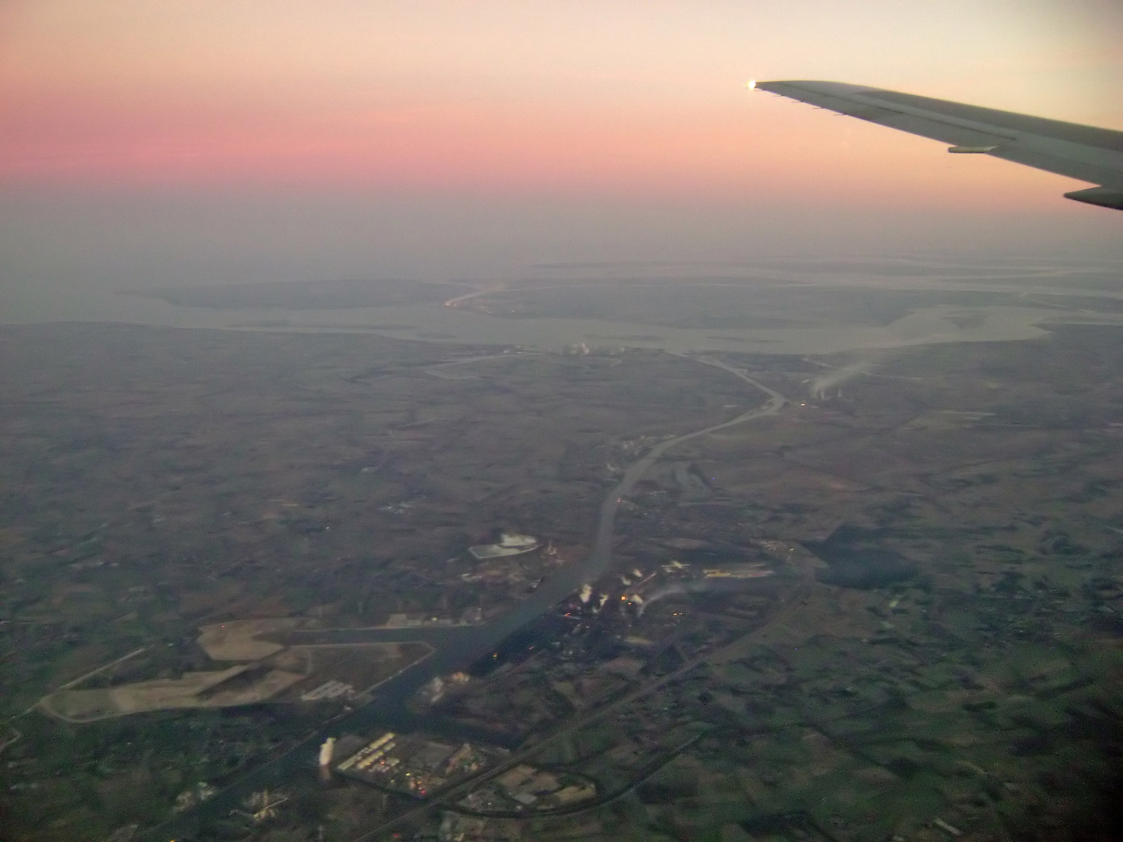 Luchtfoto van het kanaal Gent-Terneuzen